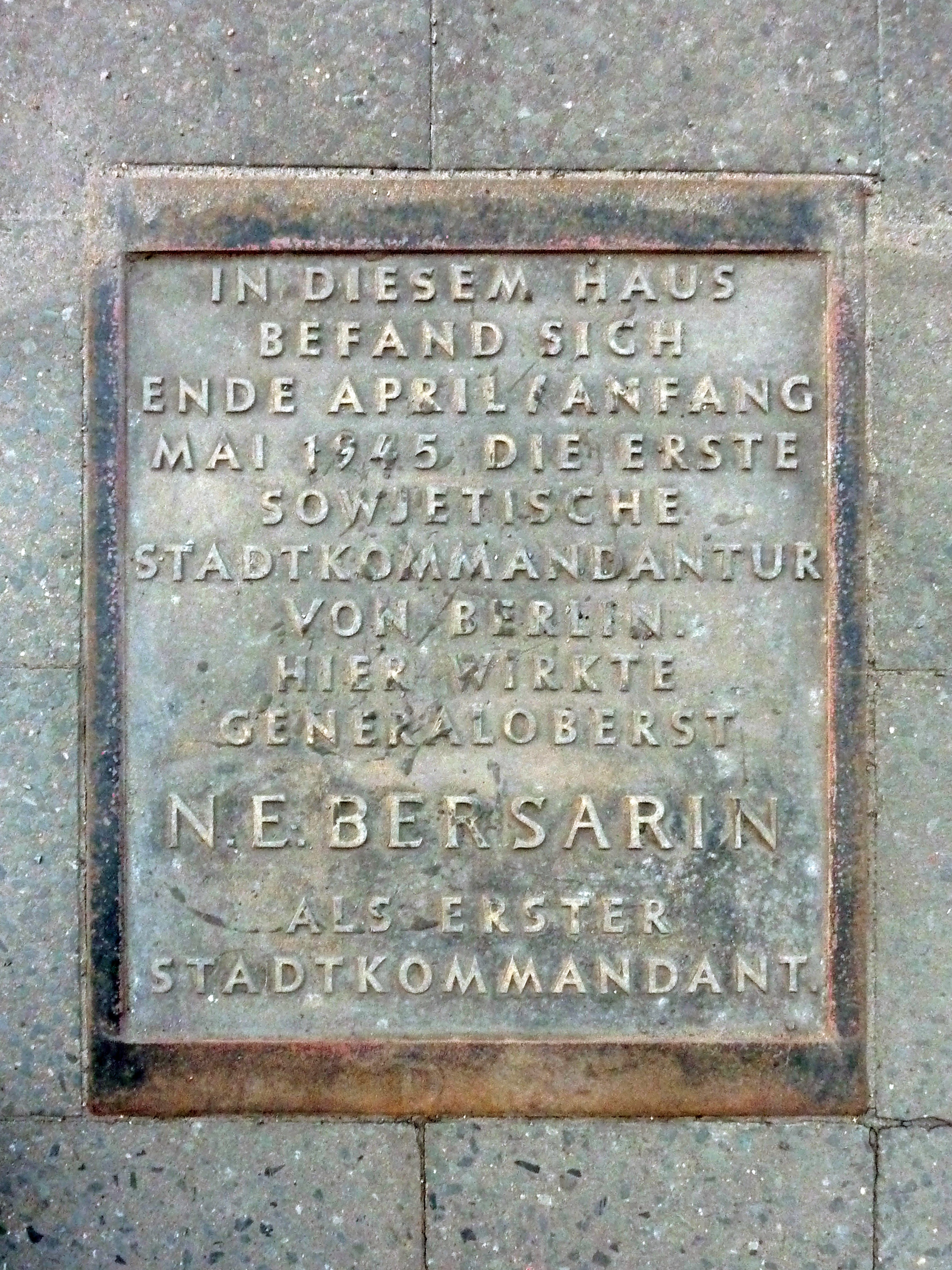 In das Bürgersteigpflaster eingelassene Gedenktafel aus DDR-Zeit für Nikolai Bersarin, vor dem Wohnhaus Alt-Friedrichsfelde 1, Ecke Rosenfelder Straße in Berlin-Friedrichsfelde. IN DIESEM HAUS BEFAND SICH ENDE APRIL/ANFANG MAI 1945 DIE ERSTE SOWJETISCHE STADTKOMMANDANTUR VON BERLIN. HIER WIRKTE GENERALOBERST N. E. BERSARIN ALS ERSTER STADTKOMMANDANT.